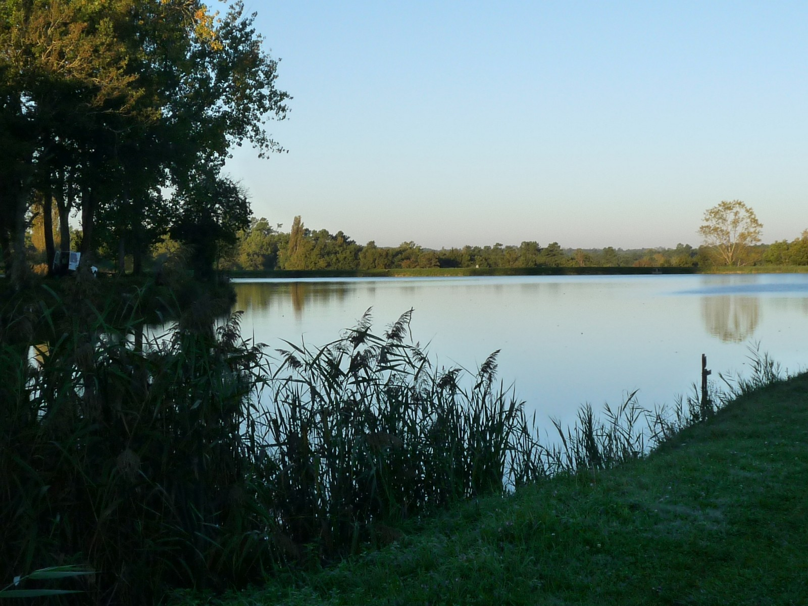 Etang de Laruscade, Gironde, France